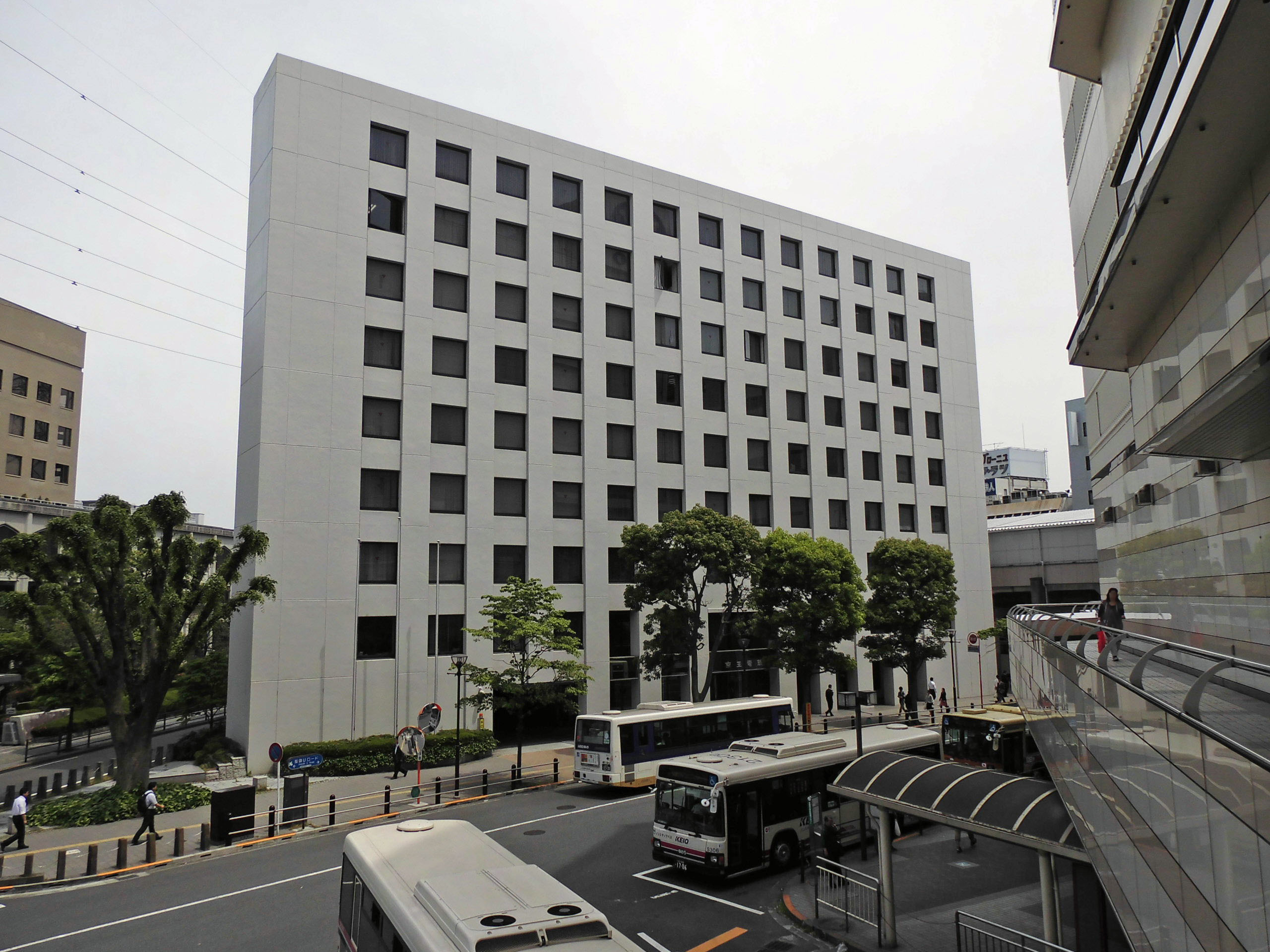 多摩市にある京王電鉄本社